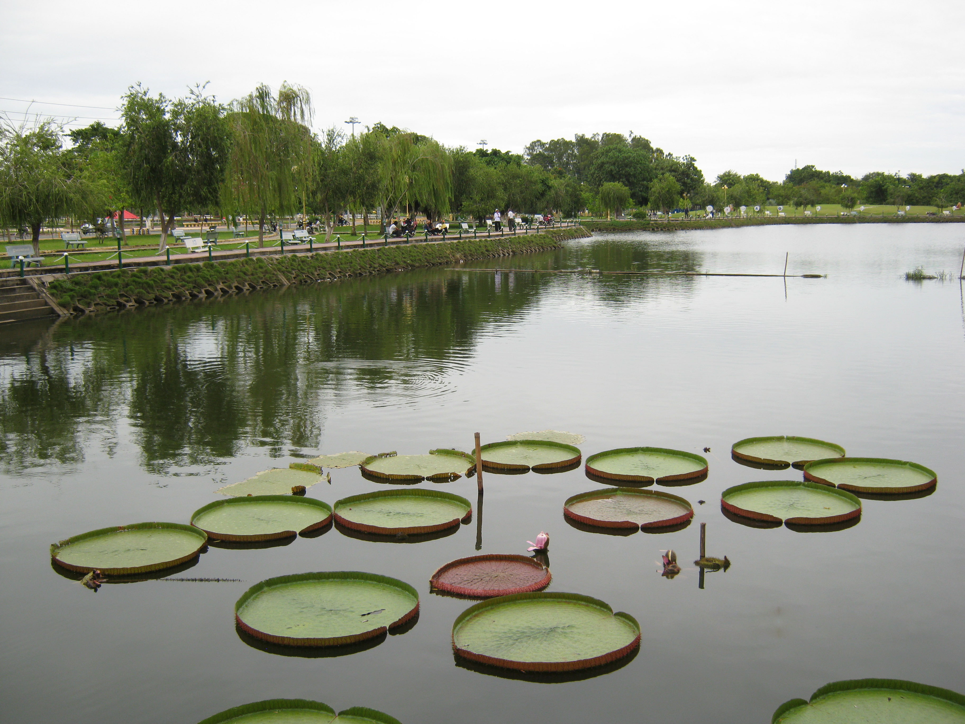 Công viên Văn Miếu ở trung tâm thành phố Cao Lãnh (Đồng Tháp, Việt Nam).